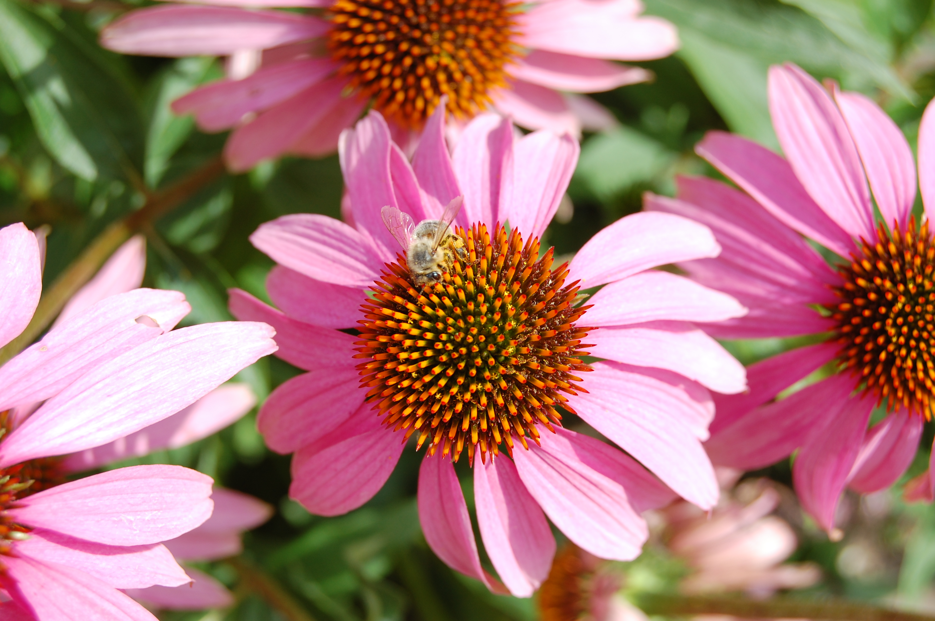 Echinacea purpurea